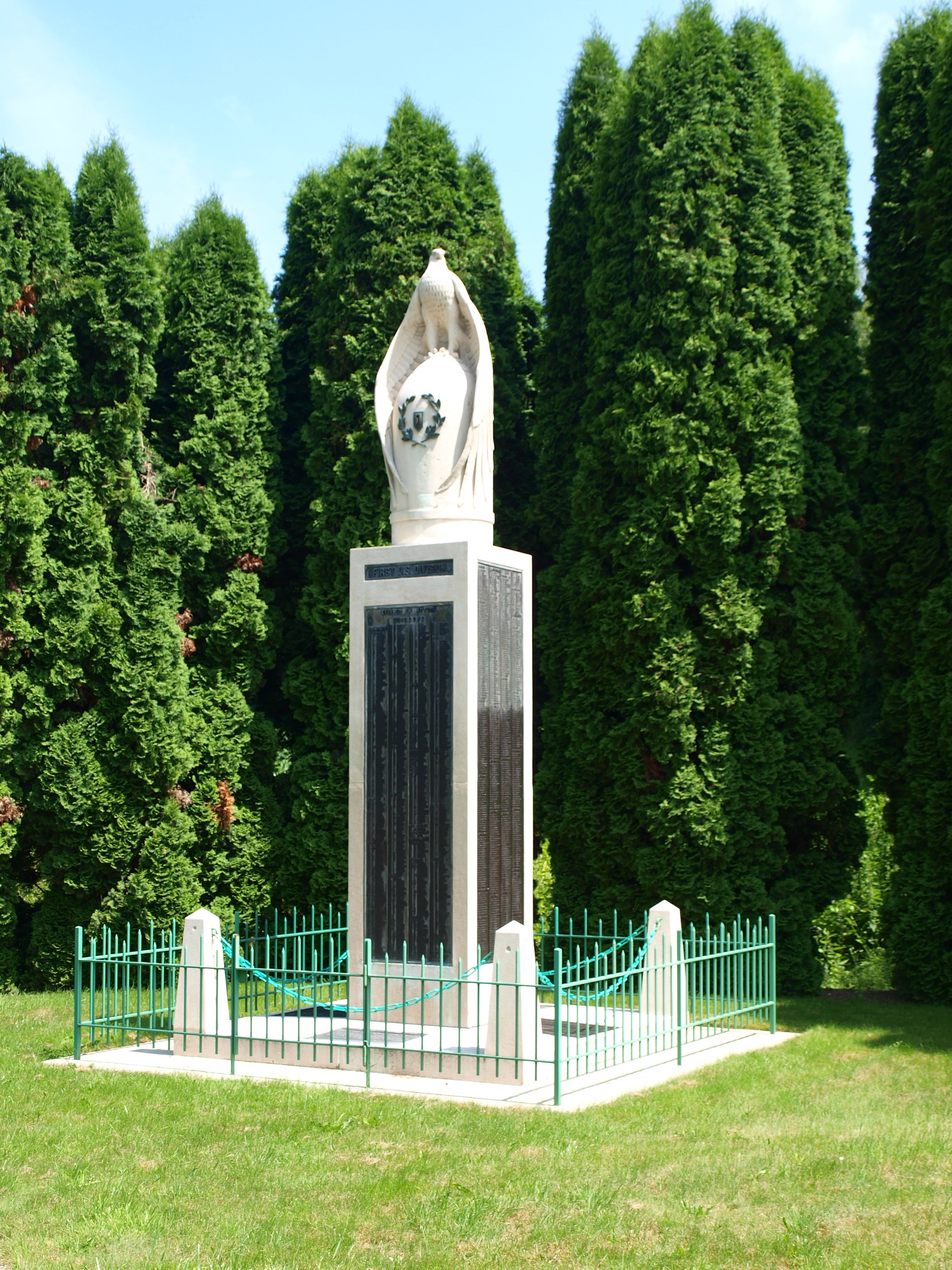 Buzancy (Aisne, France) ; mémorial aux soldats de la memorial first US division.